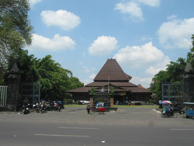 Surakarta City Hall